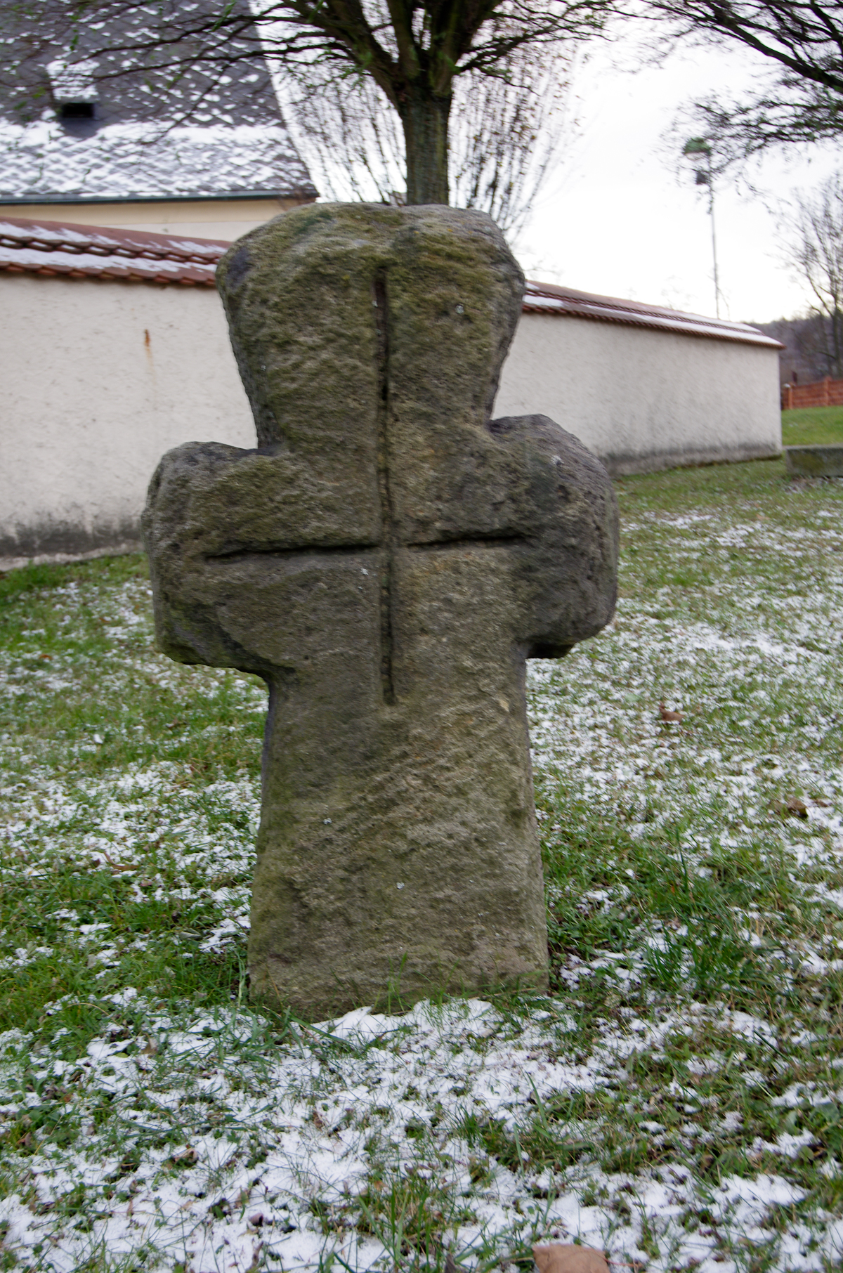 Smírčí kříž (Královské Poříčí), Královské Poříčí, stával v severním rohu zrušeného hřbitova bývalé obce Jehličná